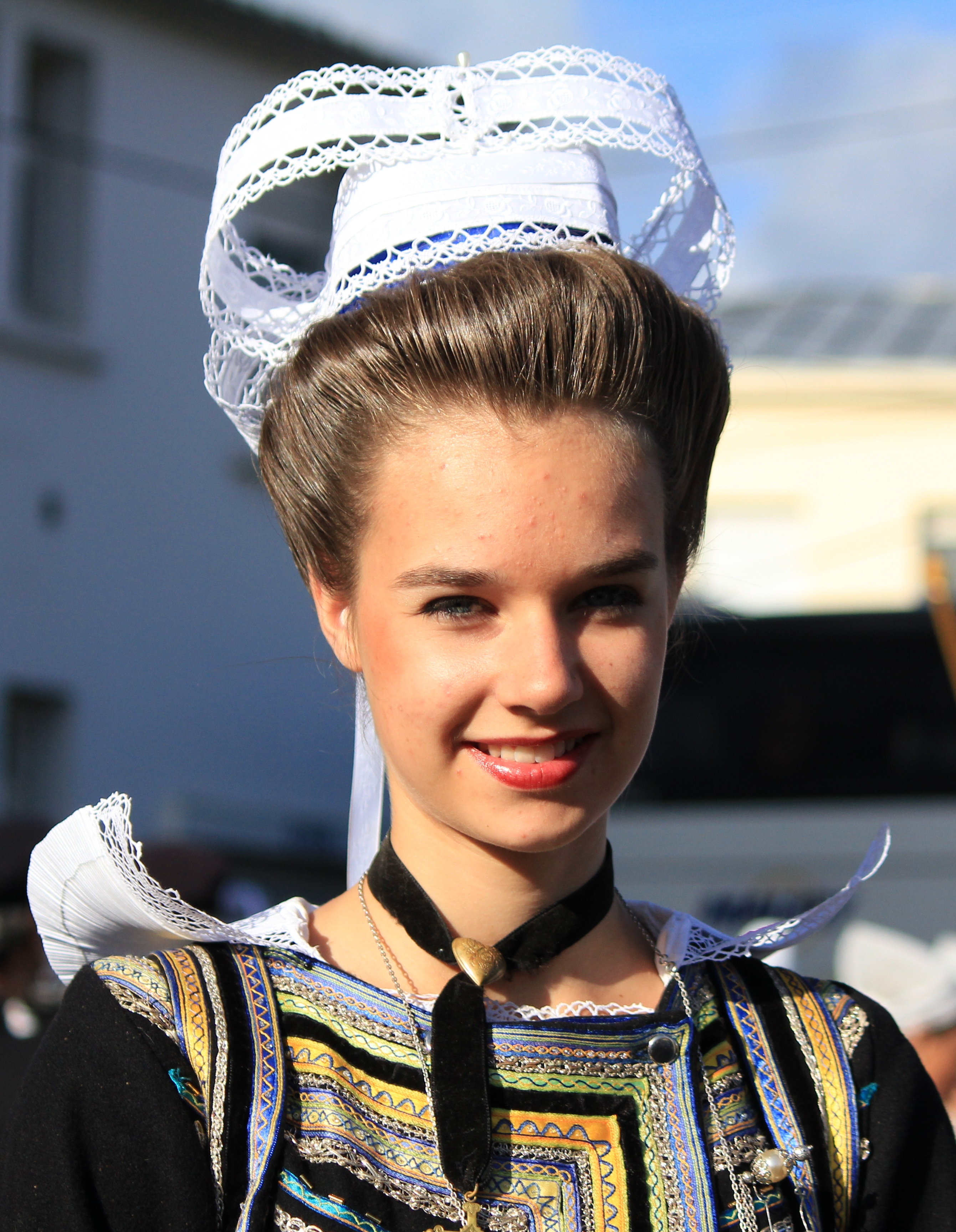 Coiffe bretonne porté par le Cercle celtique Giz'Kalon de Quimperlé pendant le Festival Interceltique de Lorient en 2012